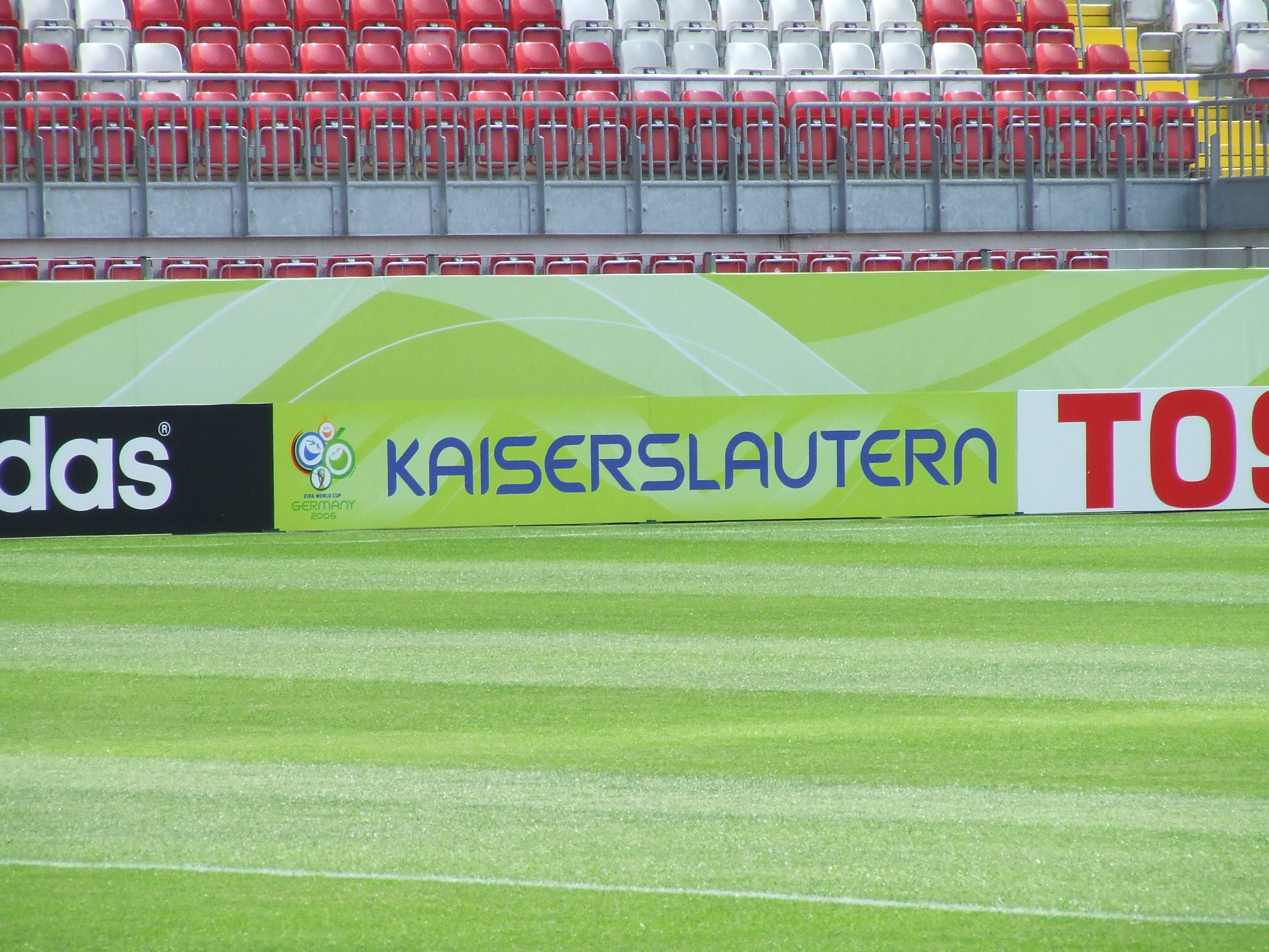 Fritz-Walter-Stadion in Kaiserslautern, vor dem FIFA WM-Spiel Australien gegen Japan.